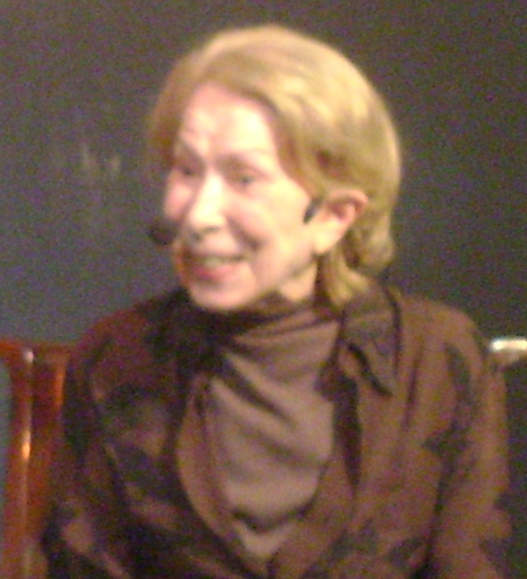 Cleyde Yáconis, atriz brasileira, no Sesc Carmo, em São Paulo.